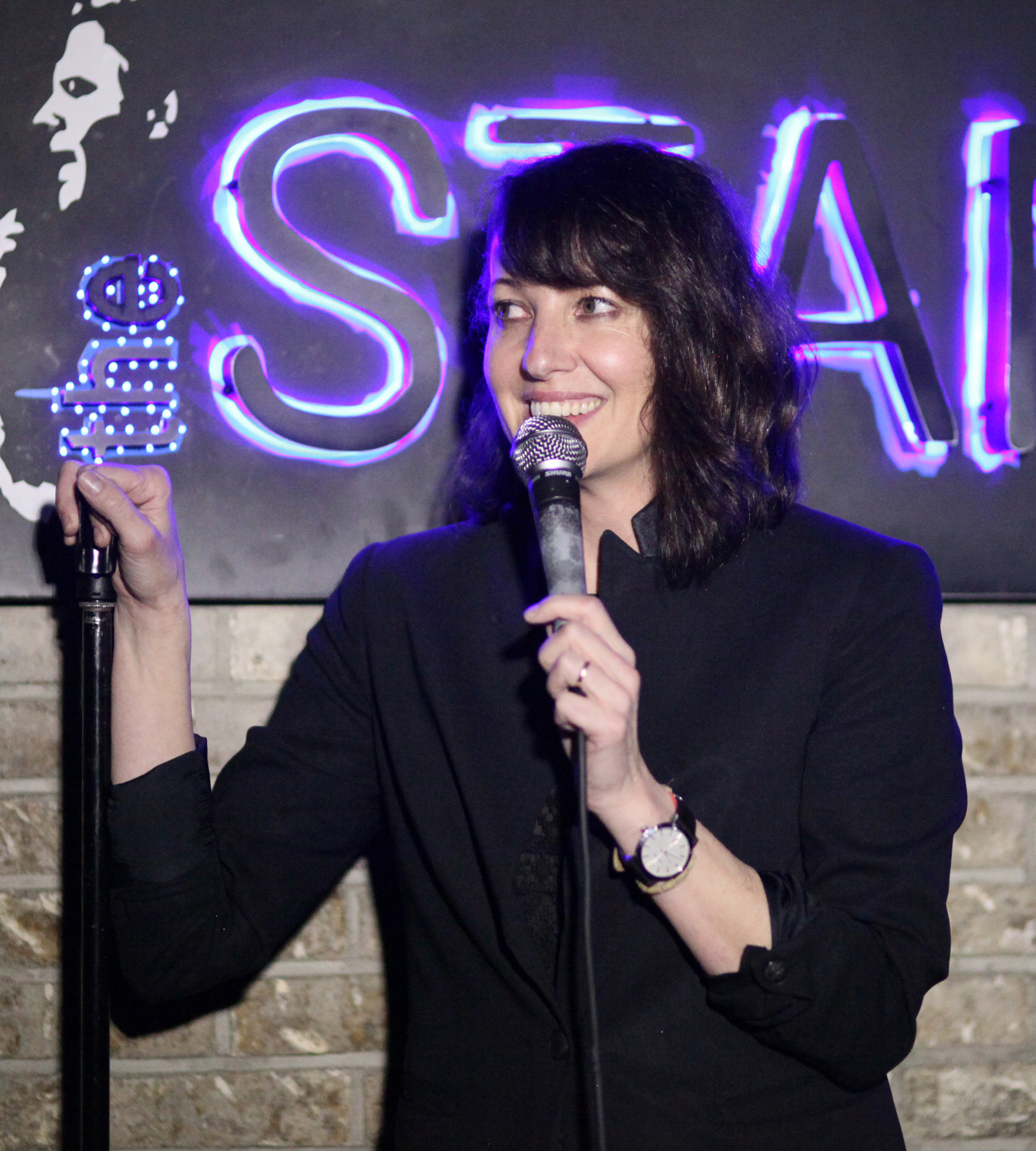 McFarlane in March 2017